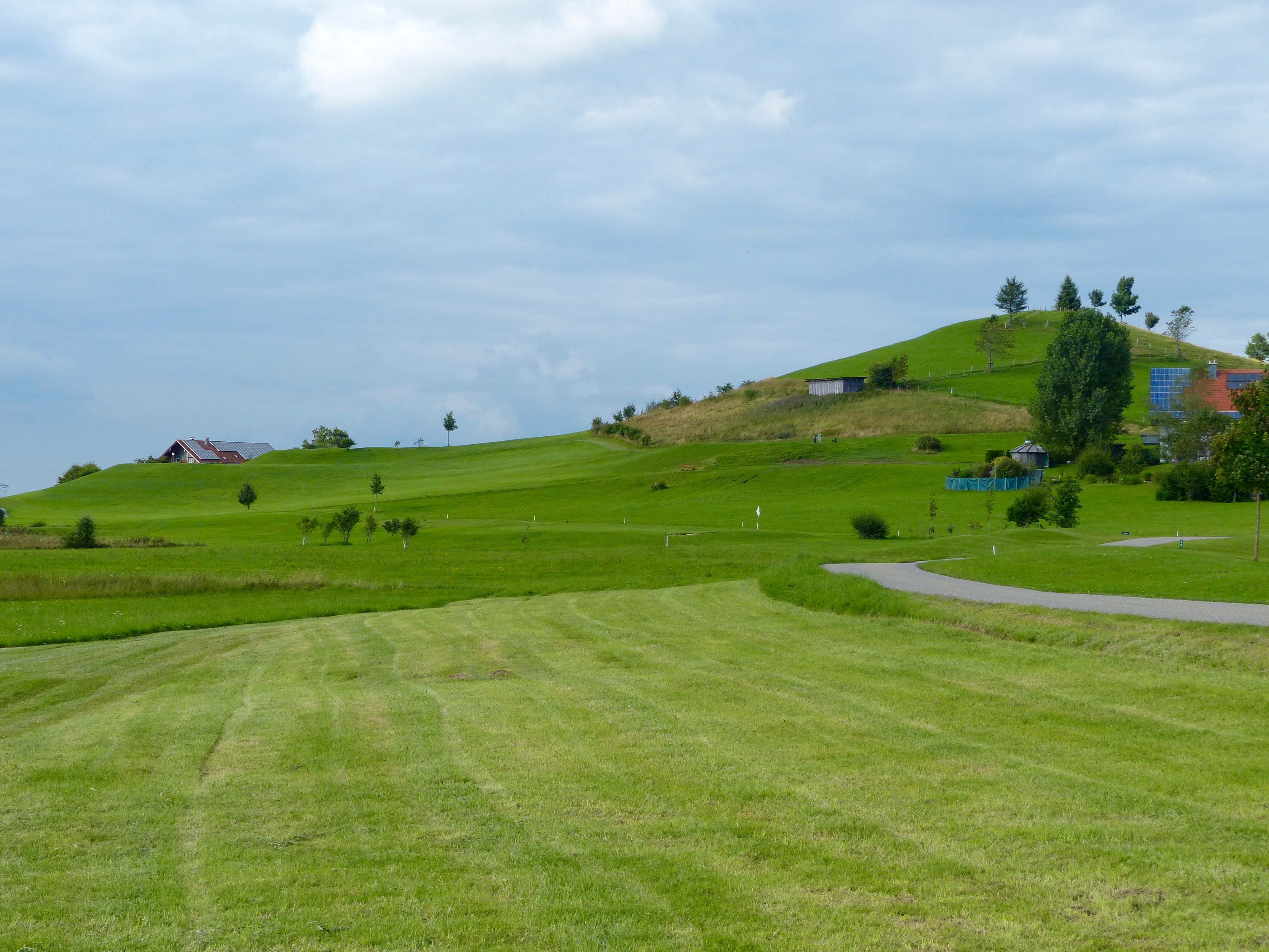 WikiProjekt Landstreicher 2016: Endmoränenwall bei Buflingsried am Roderbühl östlich von Scheidegg